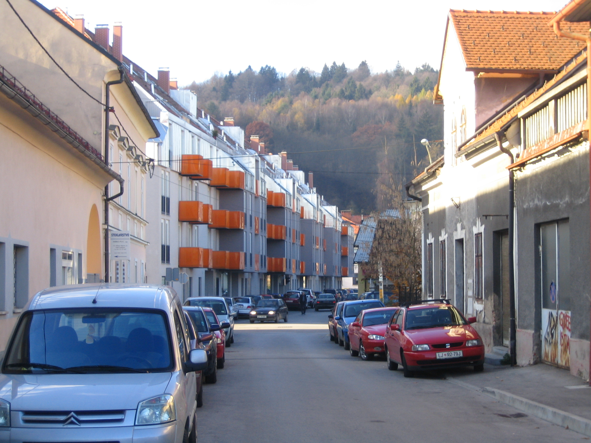 Drogerija, nova stanovanja na ulici Milana Majcna